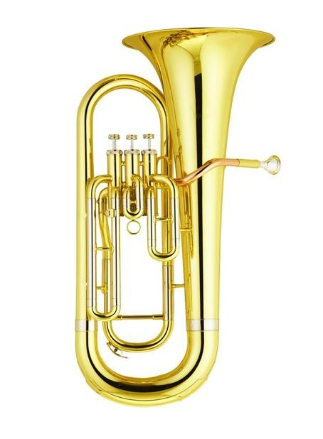 Un Flicorno Baritono